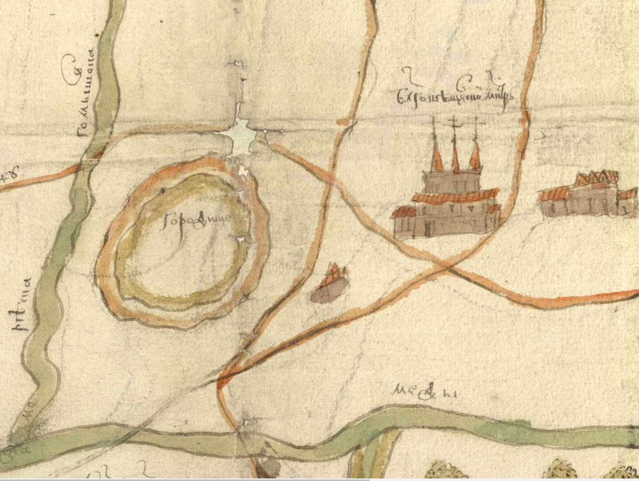 Ф. 1209. Оп. 77. Ед. хр. 19028 Чертеж земель в окрестностях Медынского городища. Подлинник. Датировка: XVII в. Документ зафиксировал исторический ландшафт и коммуникации в окрестностях Медынского городища, существовавшие в эпоху позднего Средневековья. Помимо упомянутого городища, на чертеже особо отмечены: Благовещенский монастырь, пустоши Саларево, Ивачево, Цвиленево, Челюсткино, Коркодиново, Огашино и Черневка, речки Медынка, Гомышовка и Каменка, межевые грани земельных угодий. Историческая справка: Выполненный в красках чертеж окрестностей Медынского городища был создан в Поместном приказе во второй половине XVII в. в ходе разбирательства одного из дел, которое к настоящему времени не сохранилось.